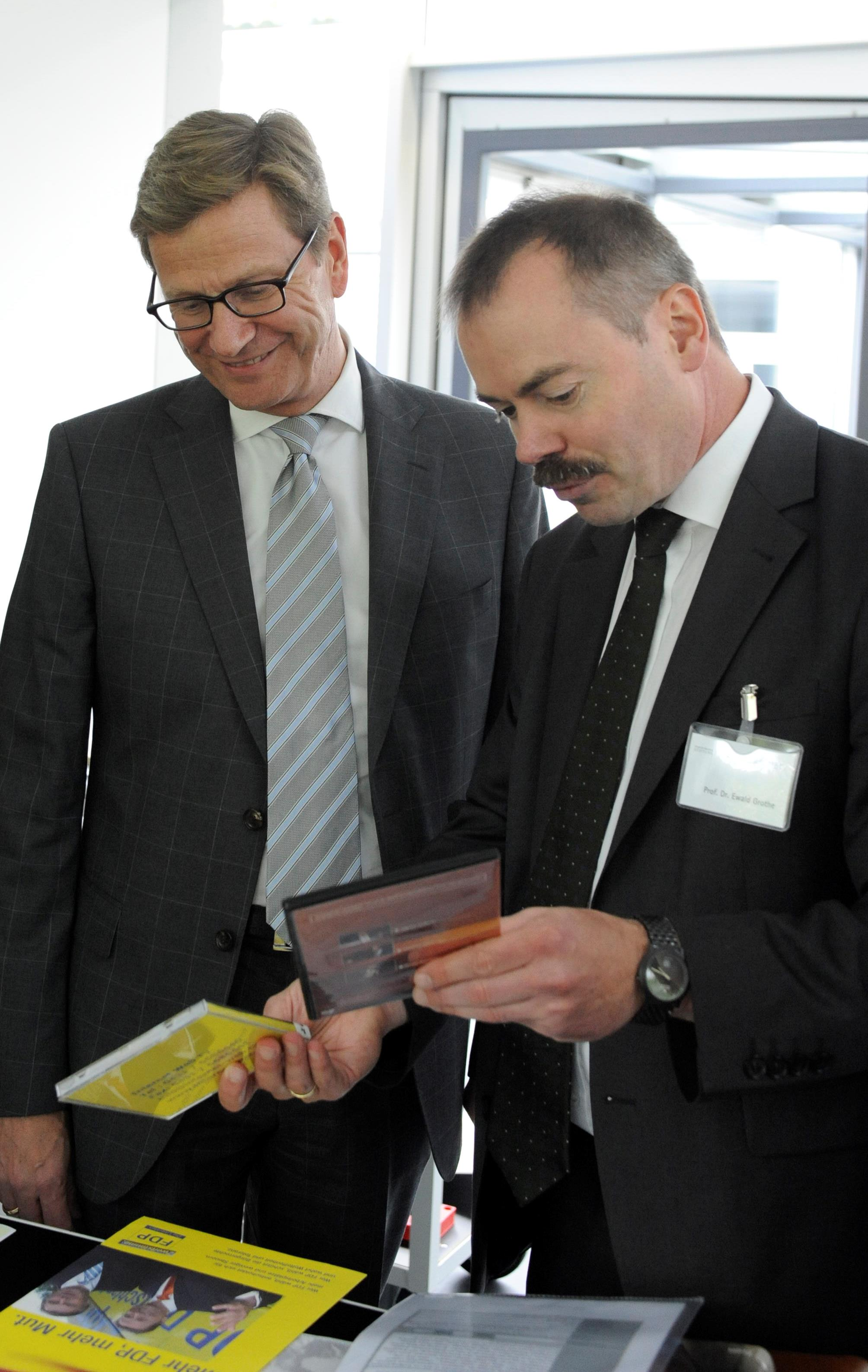 Guido Westerwelle und Ewald Grothe im ADL, 2013